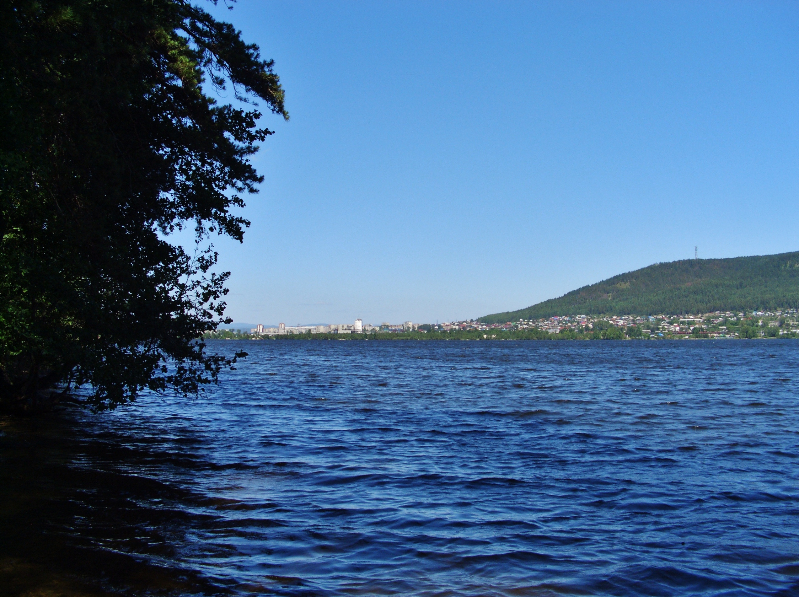 Ильменское озеро.